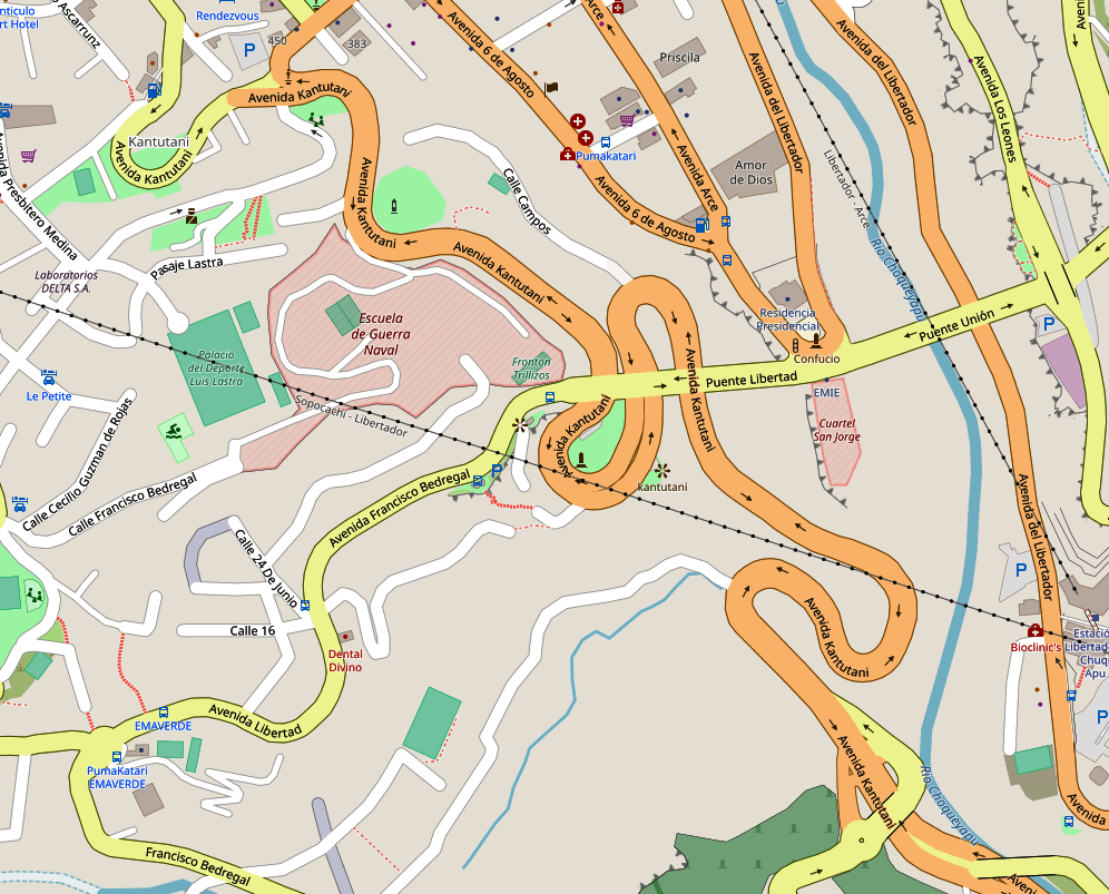 Mapa d ela Avenida Kantutani en al ciudad de La Paz, en al imagen s ehalla resaltada en color Naranja, la imagen corresponde a enero de 2019.